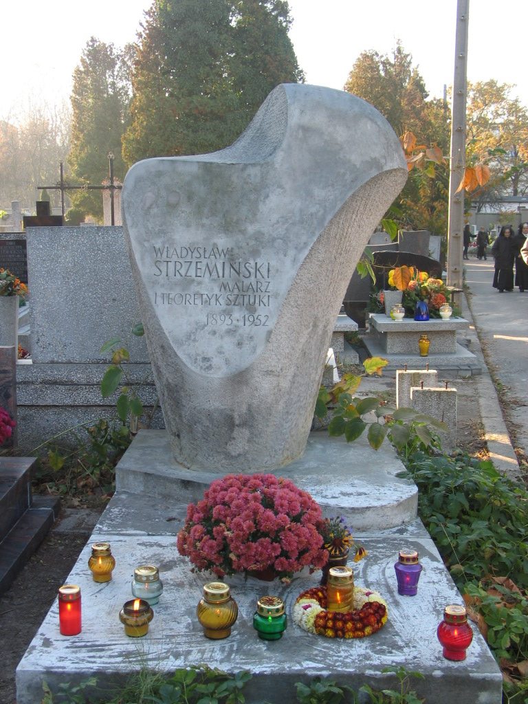 Grób Władysława Strzemińskiego w Łodzi. Zaprojektowany przez Karola Tchorka w 1962 roku.